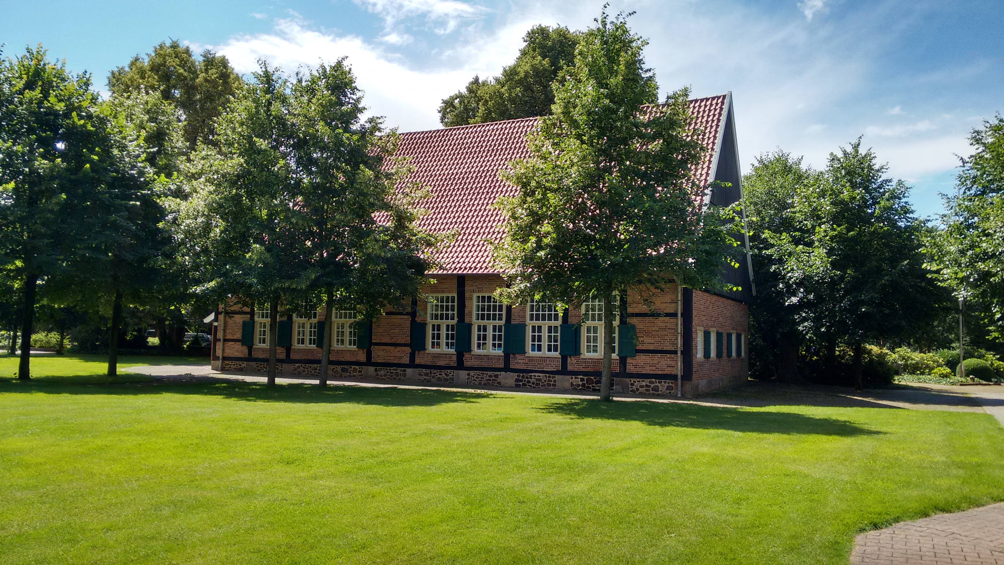 Verwalterhaus (Stiftsmuseum)